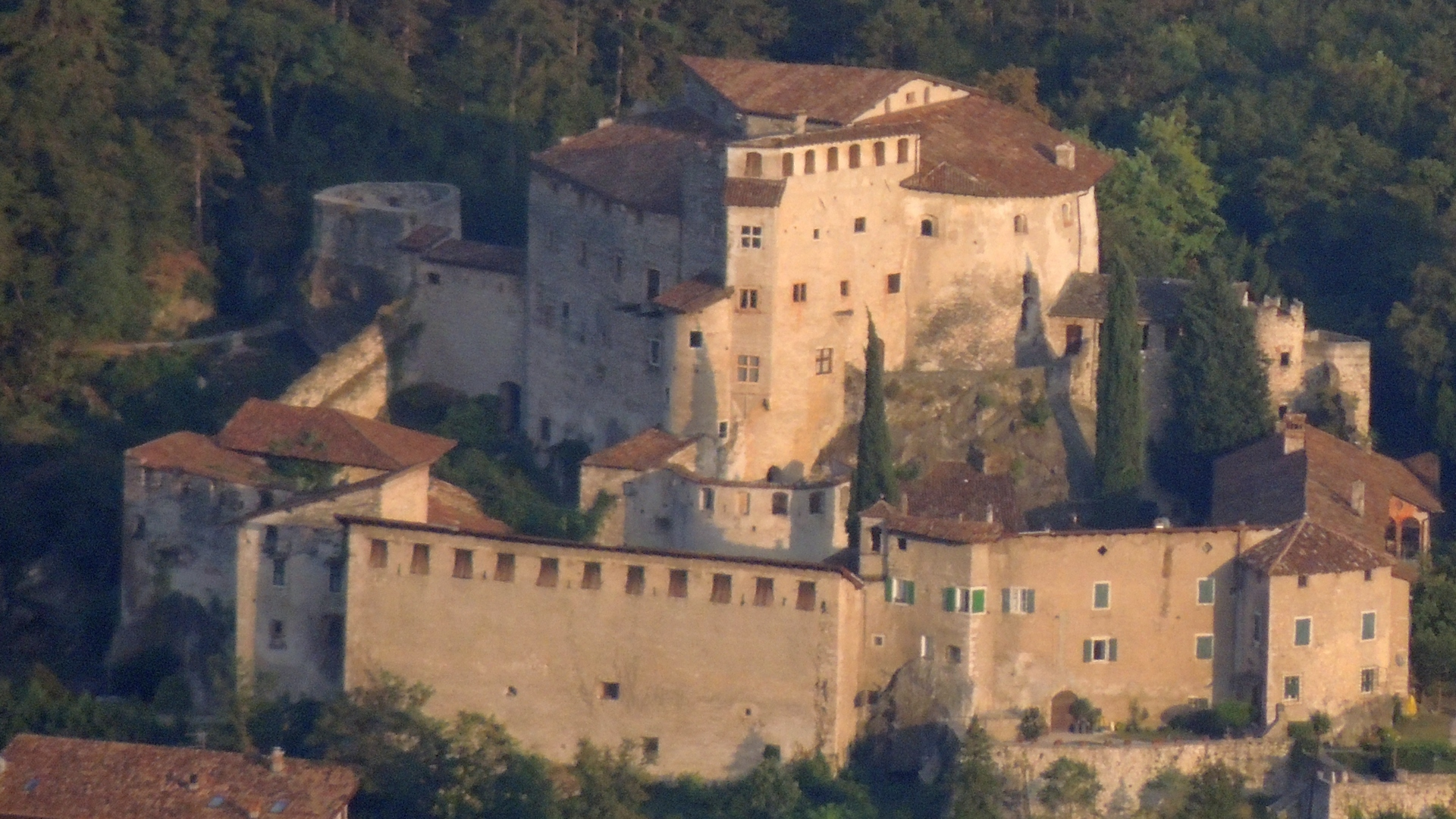 Castel Pietra (TN) Italy